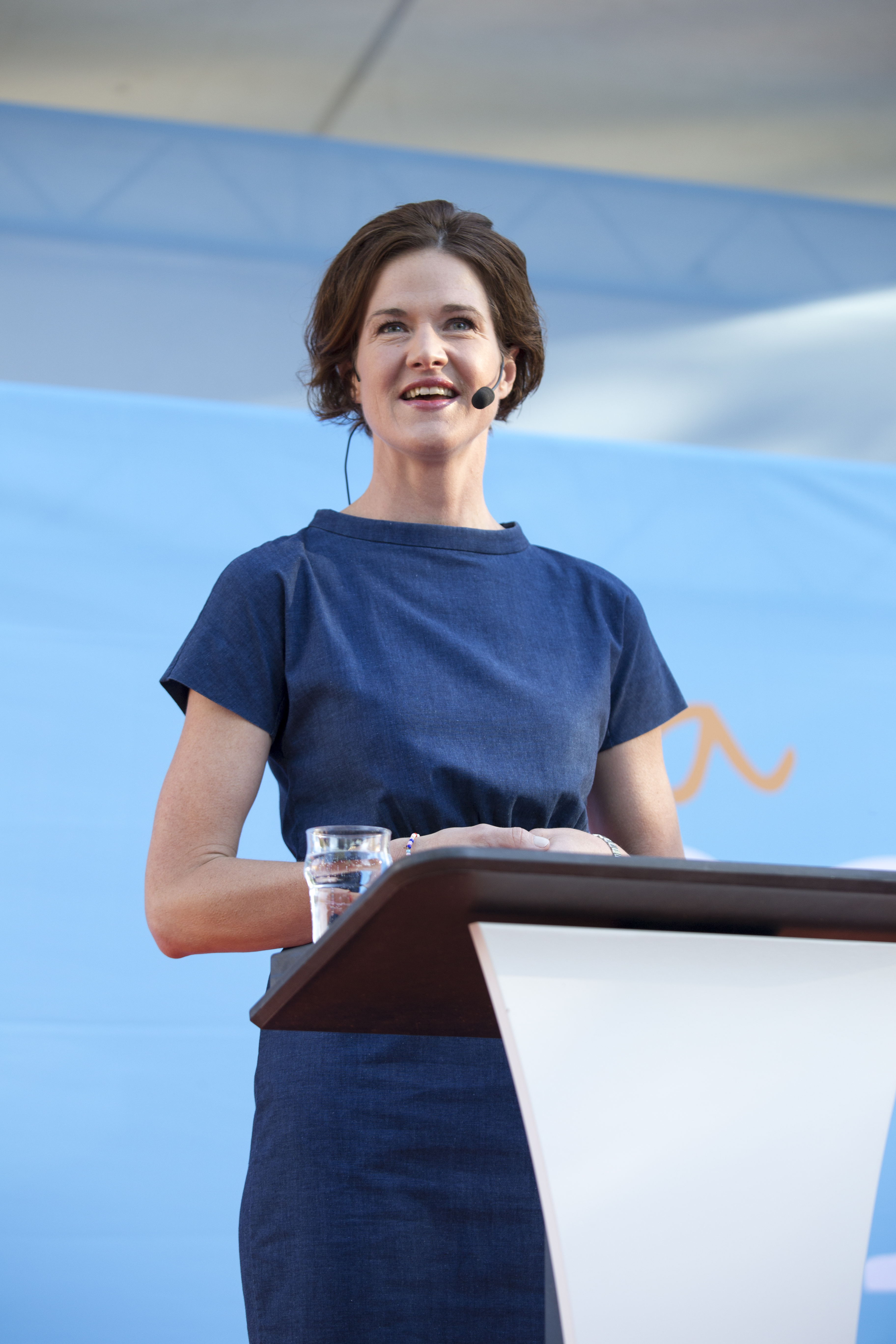 Anna Kinberg Batra 2